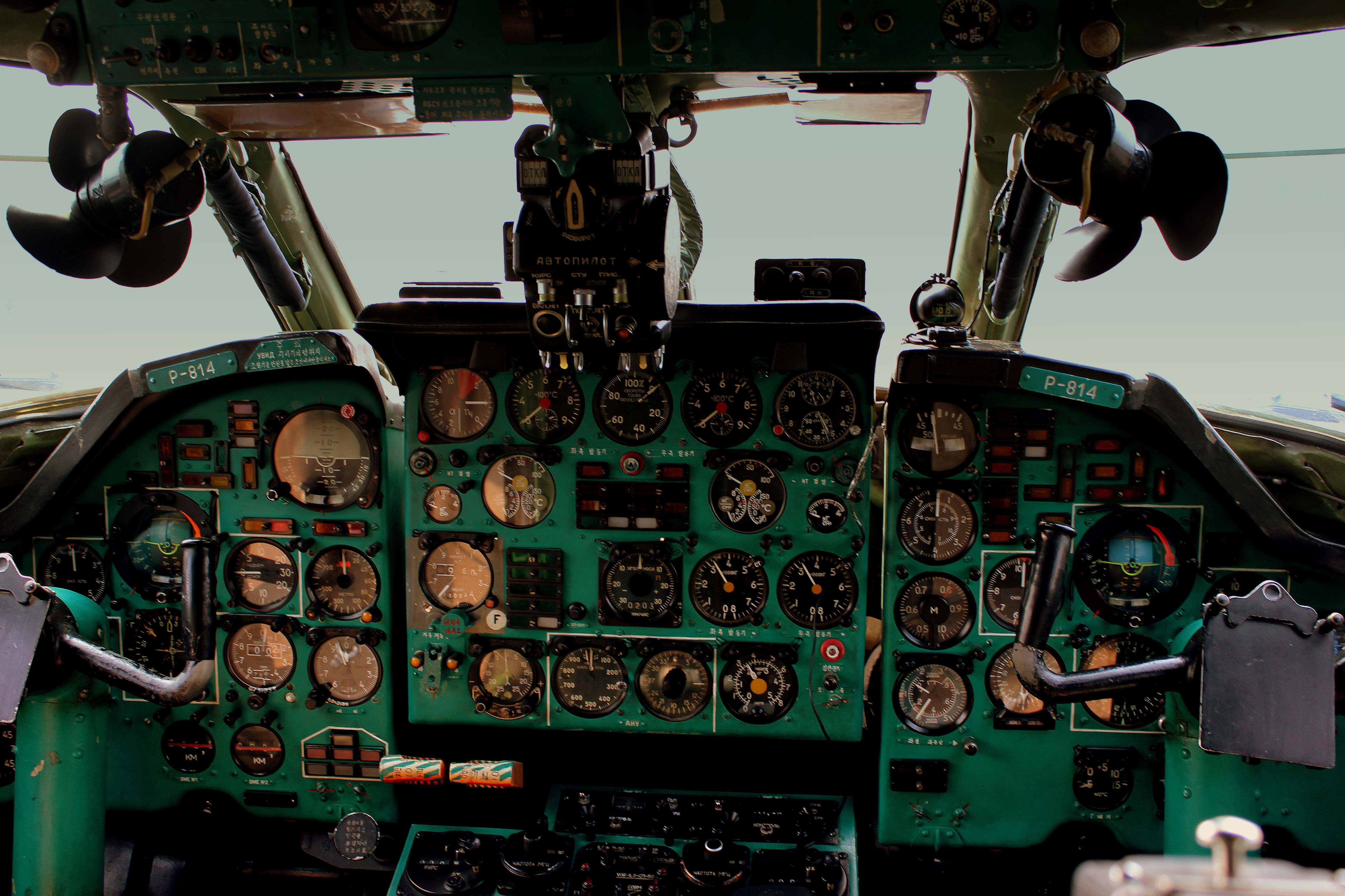 FLIGHT DECK OF P814 AIR KORYO TUPOLEV TU134 AT PYONGYANG AIRPORT DPR KOREA OCT 2012